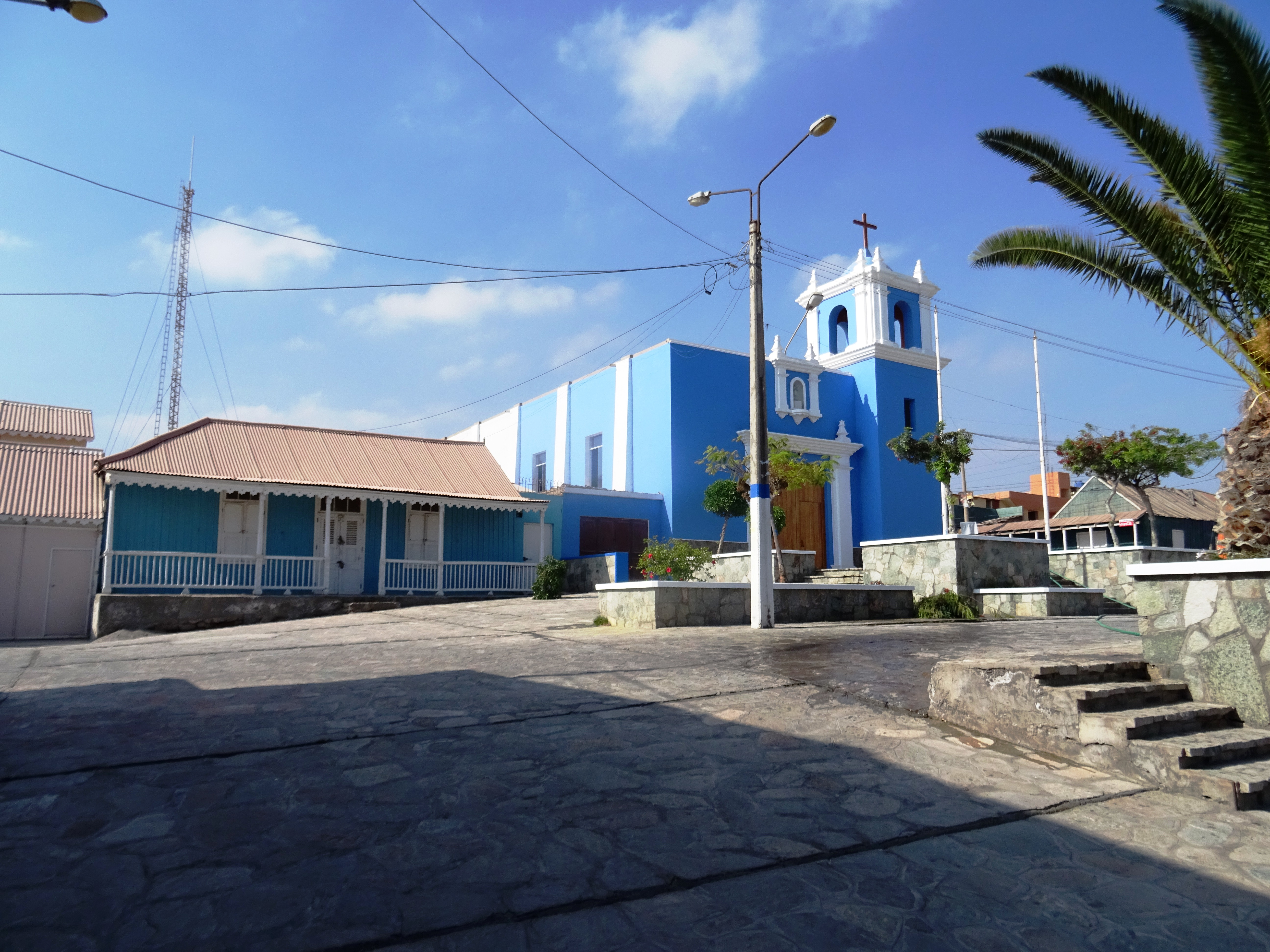 Iglesia la Inmaculada en el distrito de Mejía, provincia de Islay departamento de Arequipa, Perú